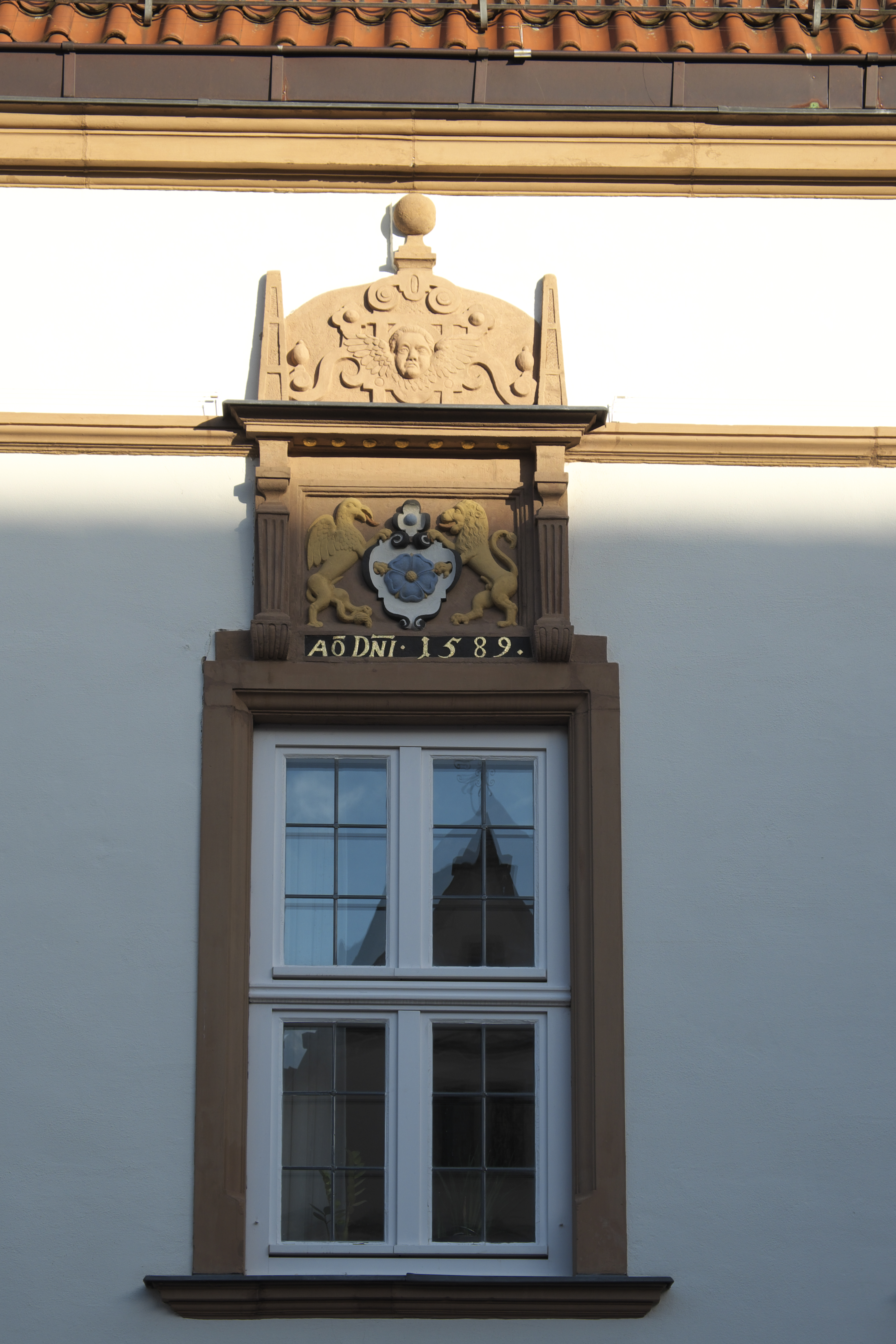 Rathaus in Lemgo im Kreis Lippe (Nordrhein-Westfalen), Mittelstraße/Marktplatz, Winteppenhaus mit Stadtwappen über dem Fenster